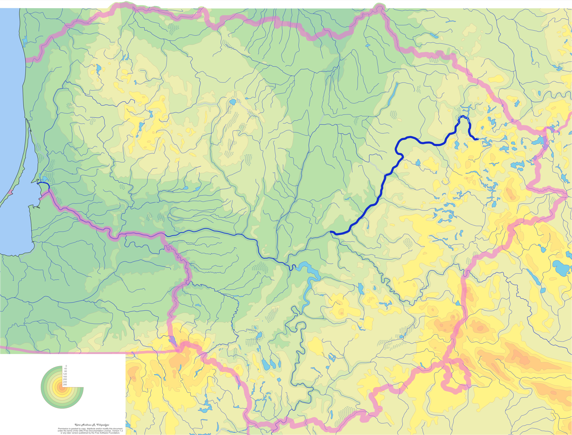 Šventoji River (Lithuania)